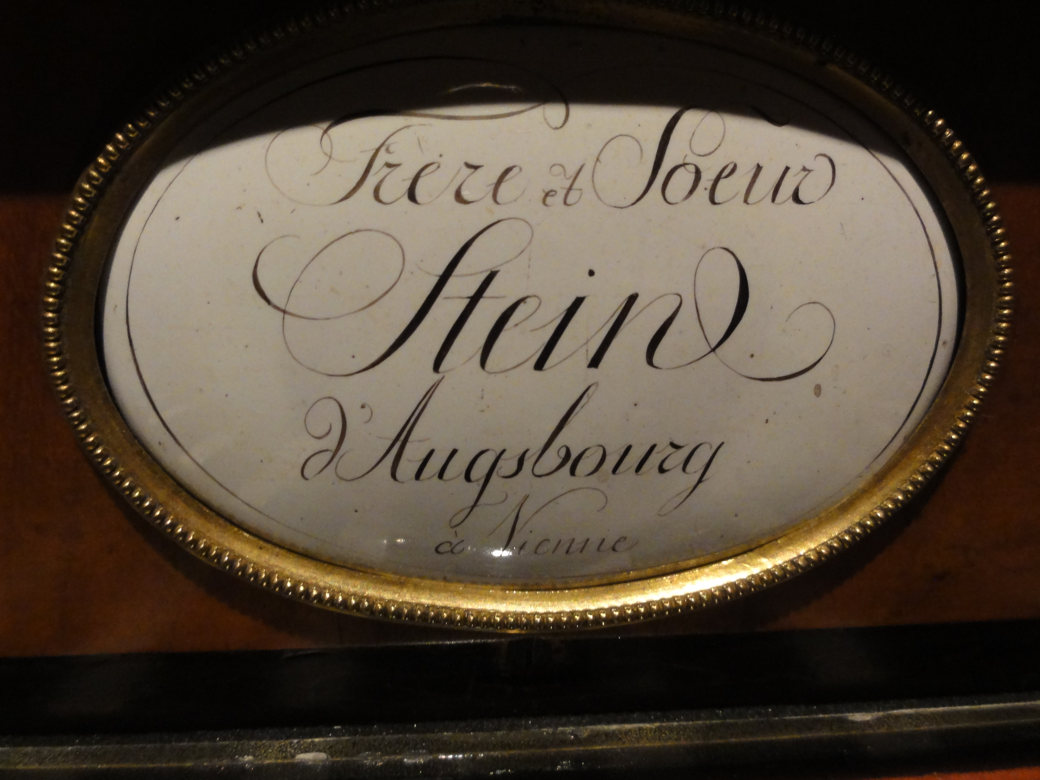 Basel, Musikmuseum — Schild „Frère et Soeur Stein Augsbourg à Vienne“ an einem Instrument